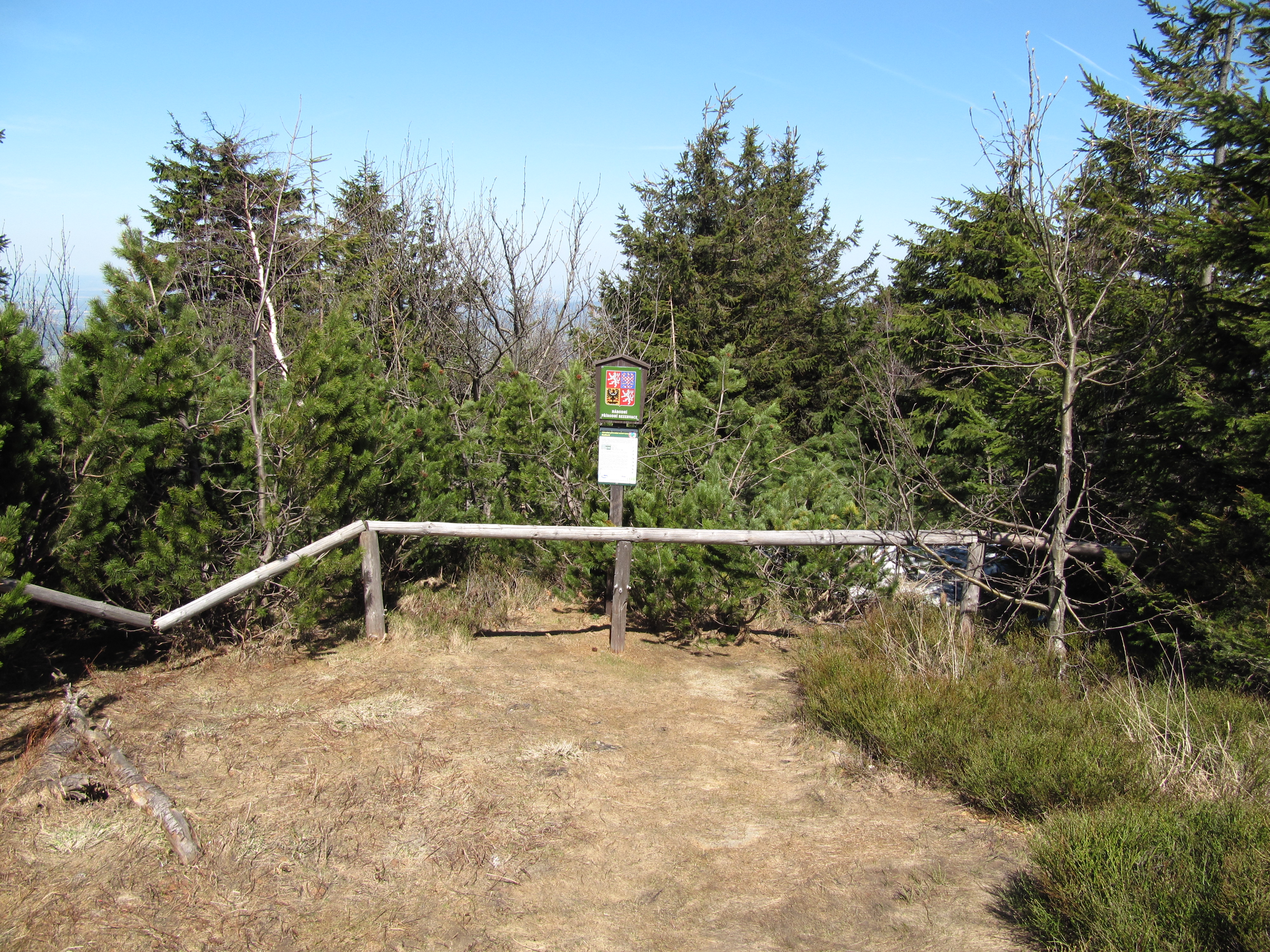 Radhošť, rezervace, tabule